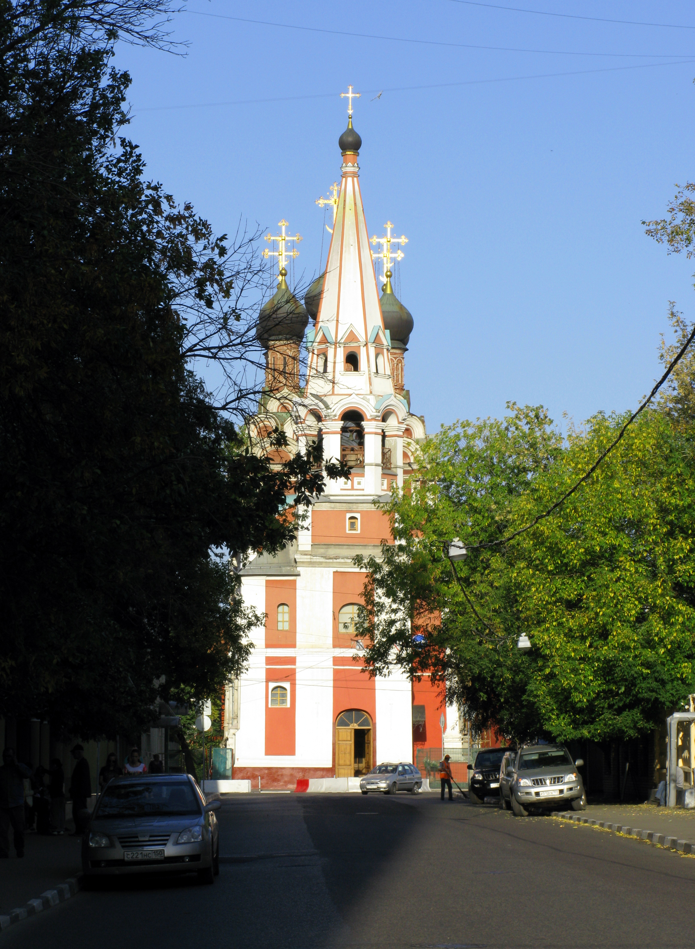 Церковь Николая Чудотворца на Болвановке (Москва)